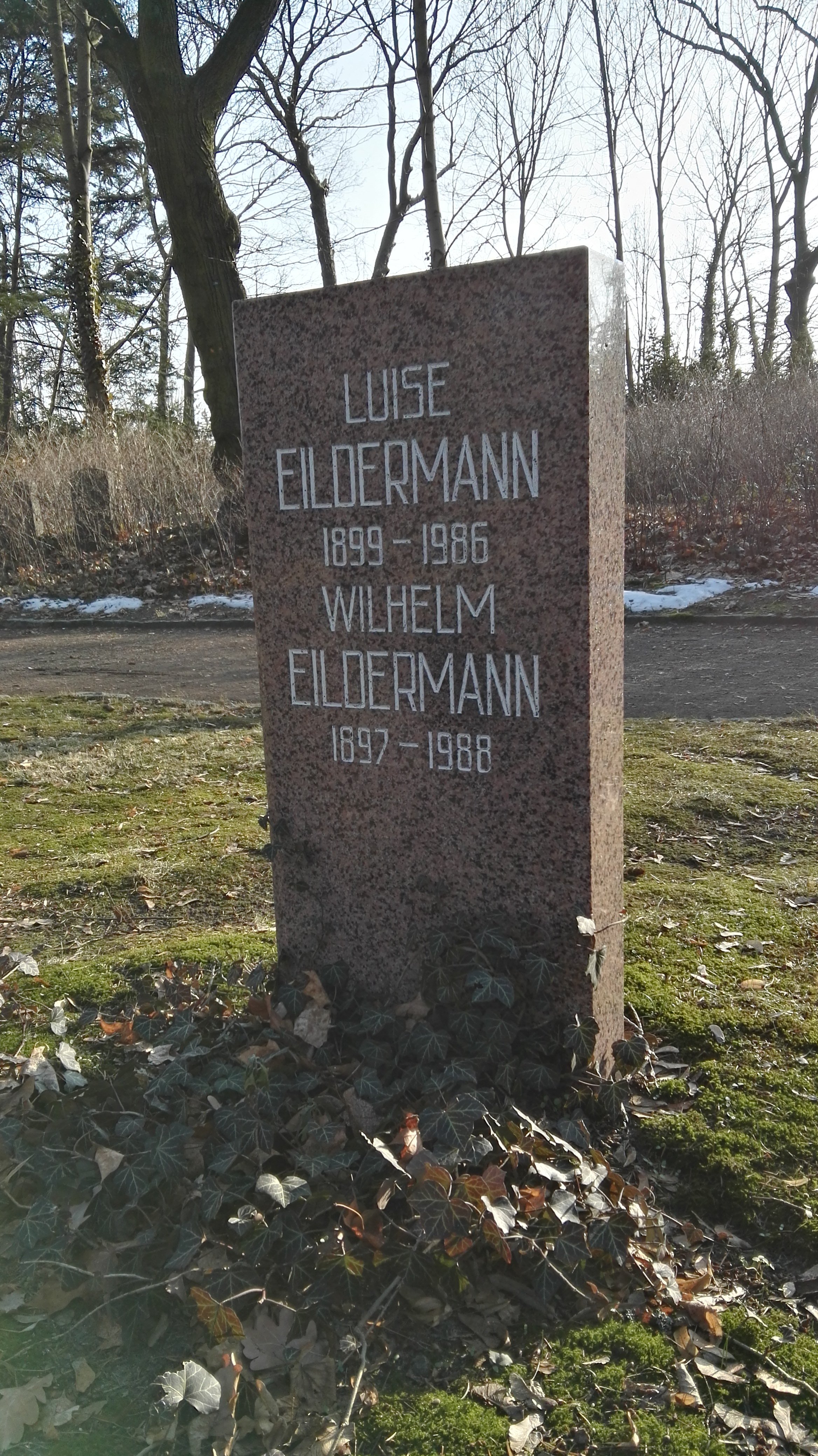 Grab von Wilhelm Eildermann und Luise Eildermann in der Grabanlage Pergolenweg auf dem Sozialistenfriedhof des Zentralfriedhofs Friedrichsfelde